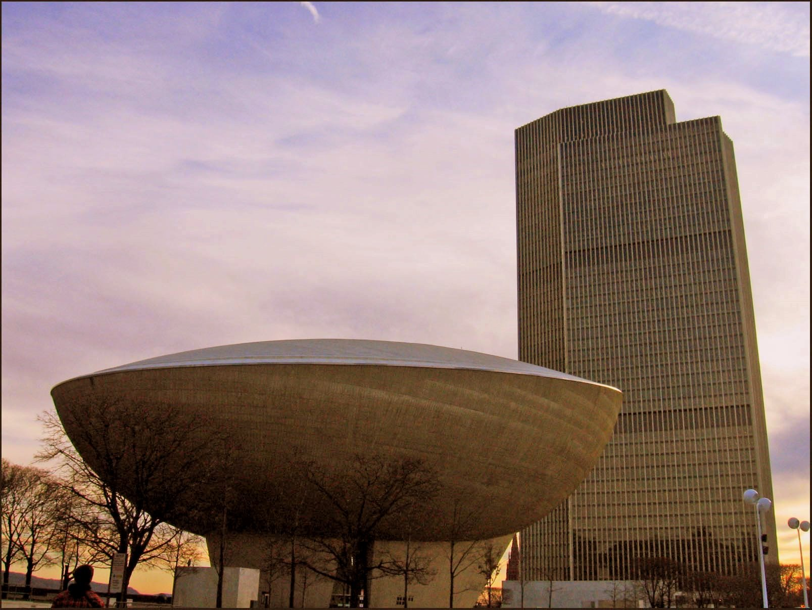 Empire Plaza in Albany, NY